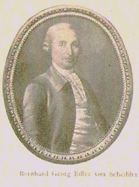 Scan eines Porträts aus dem Scheiblerschen Familienbuch